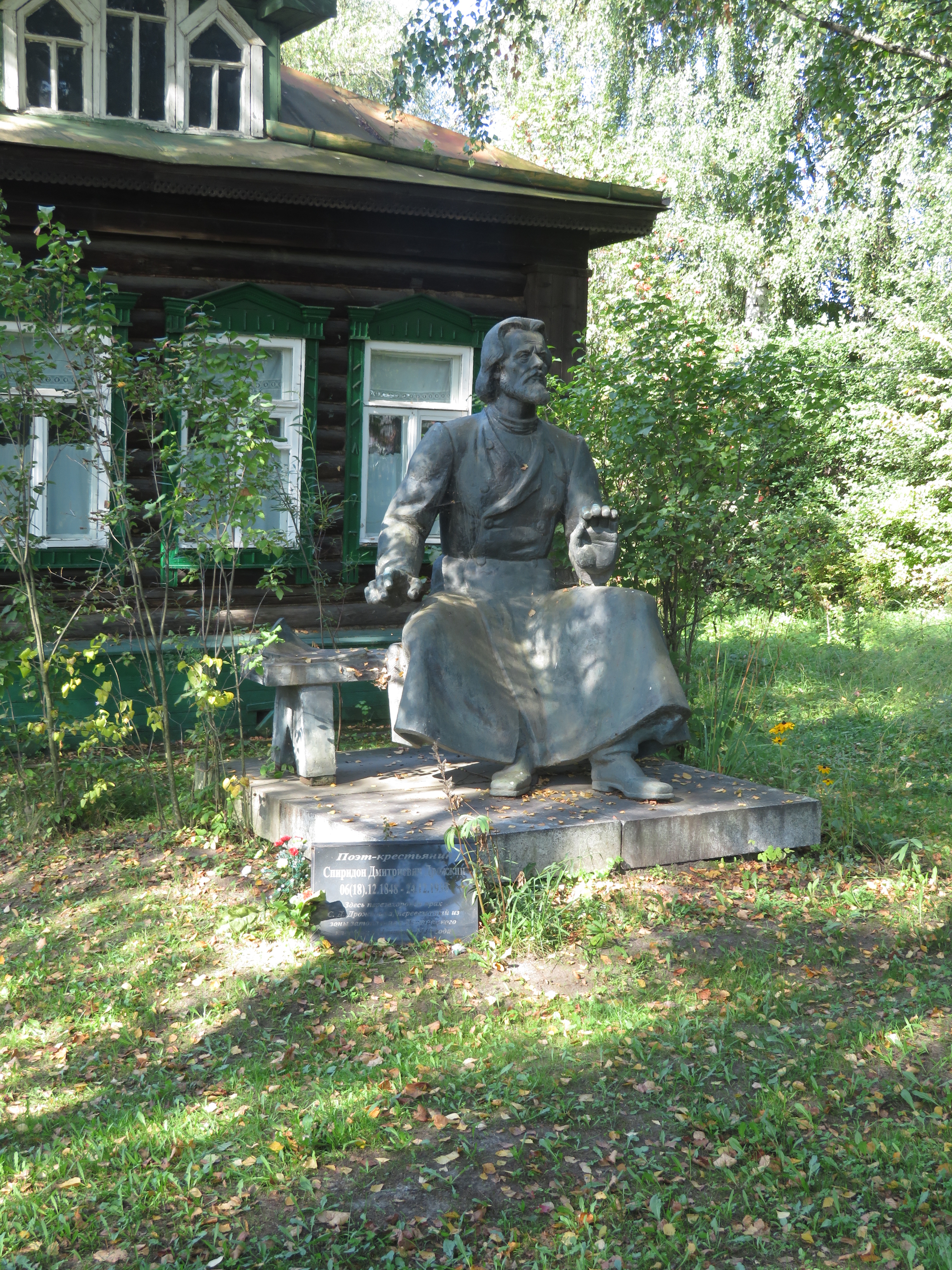 Могила С.Д. Дрожжина, поэта: улица Советская, 5, рядом с домом, Новозавидовский, Конаковский район, Тверская область